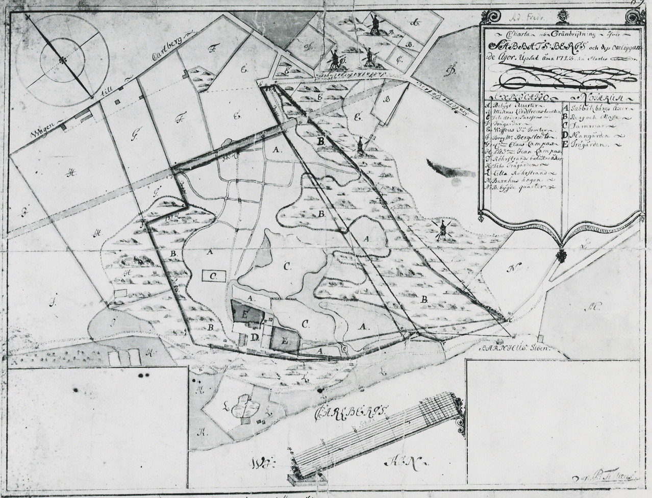 Vallentin Sabbatsberghs egendom (nuvarande Sabbatsberg)